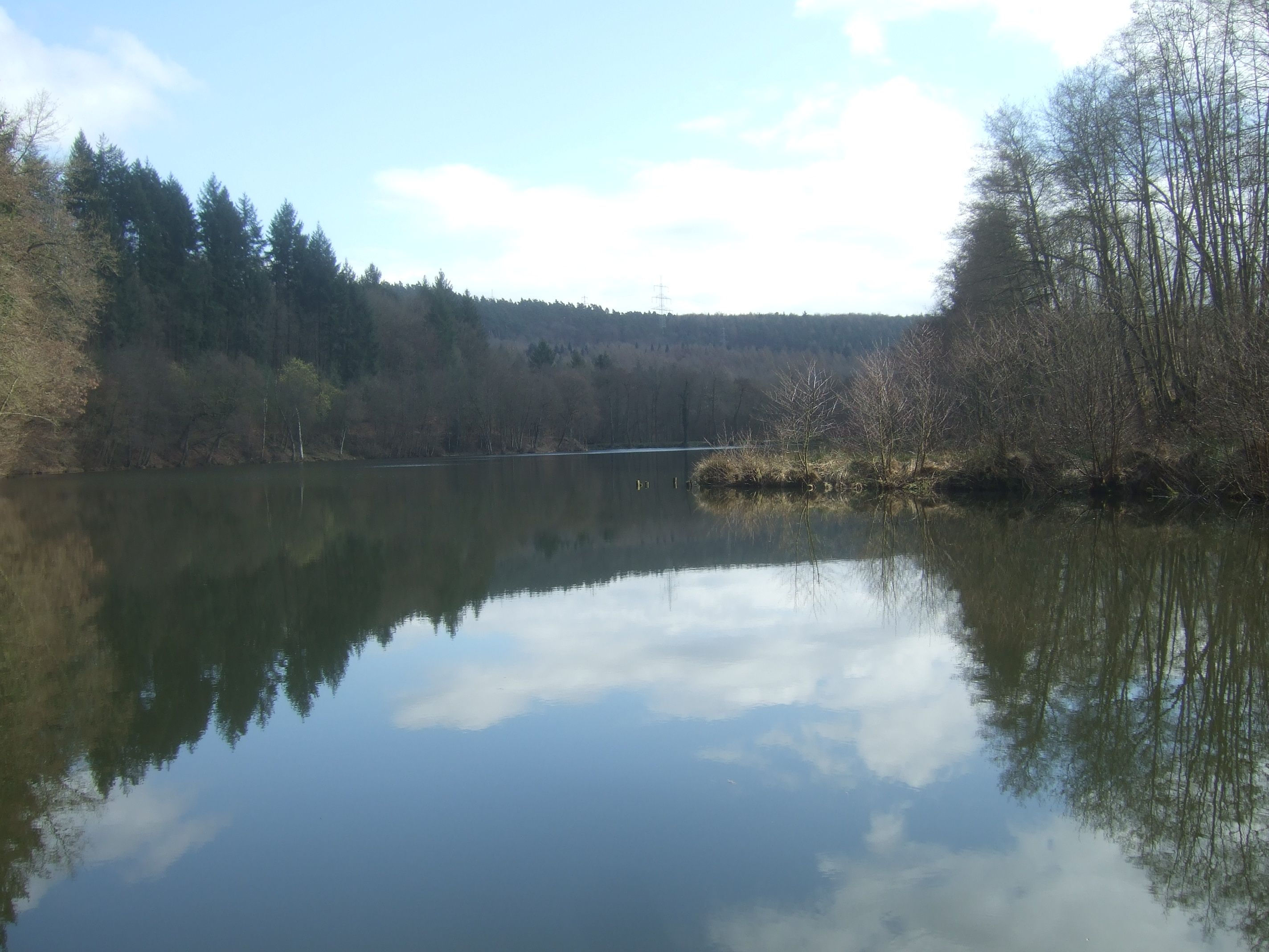 Kaiserhammerweiher am Quintbach